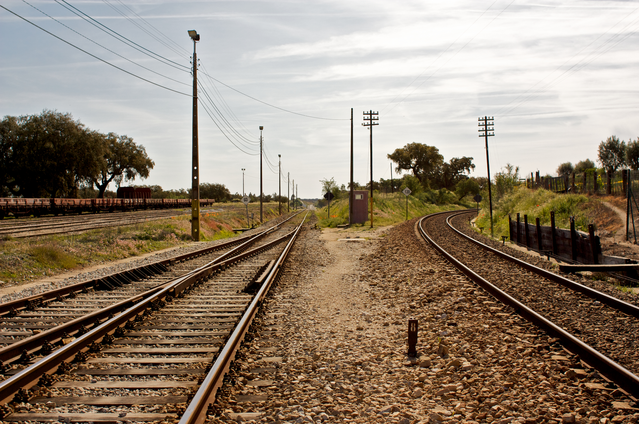 à esquerda, a Linha de Évora. à direita, a Linha do Alentejo. Via férrea: Linha de Évora e Linha do Alentejo [PK 90] Local: Estação de Casa Branca Data e hora: 5 de Abril de 2009 [10h34] Sentido: Évora e Funcheira